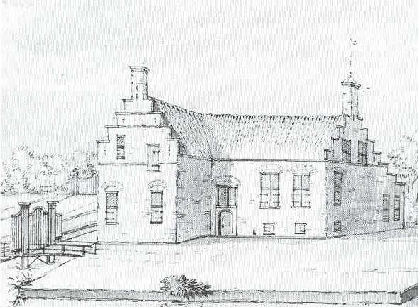 Een afbeelding van Lycklama State uit 1720, getekend door Stellingwerf.